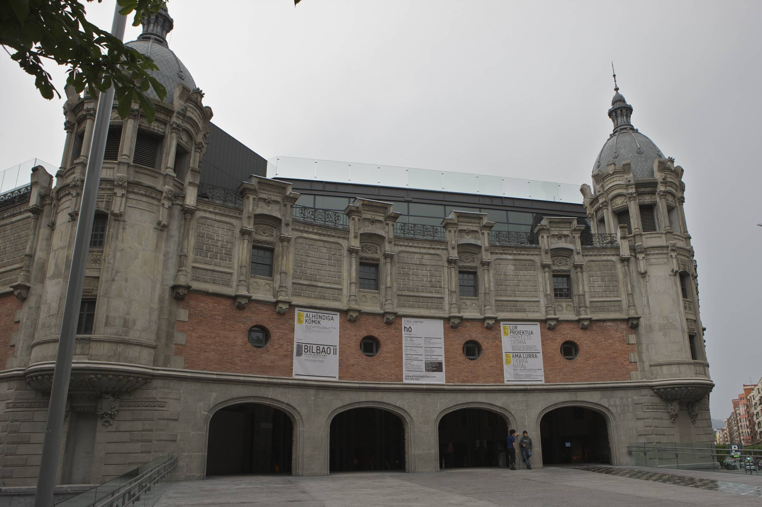 Bilboko Alondegiaren fatxada nagusia